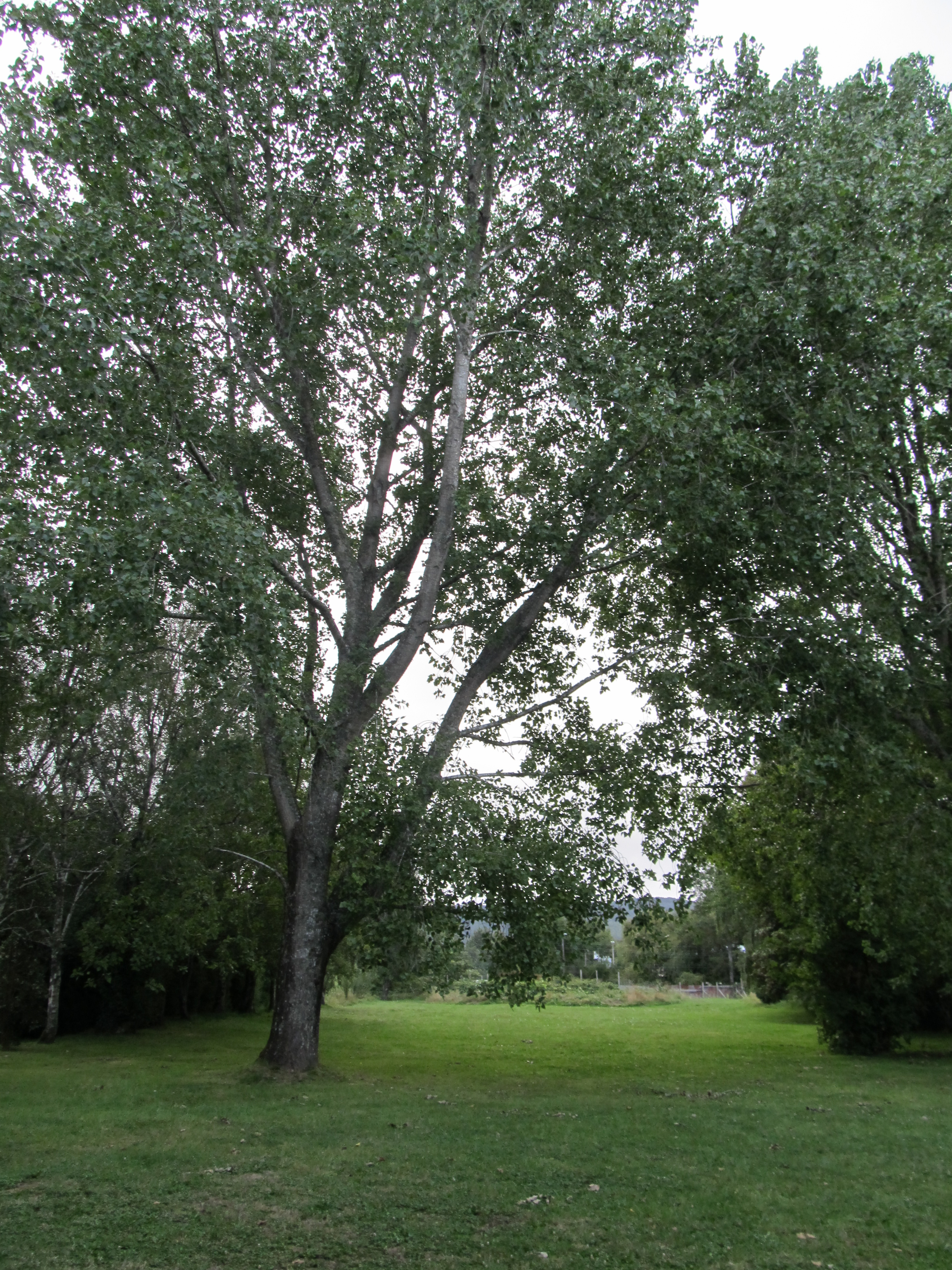 Parque Prochelle This is a photo of a national monument in Chile: 698